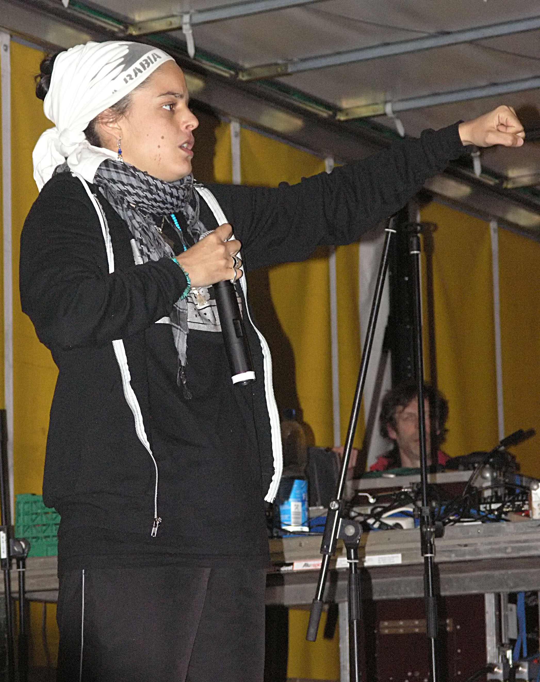 Die französische Rapperin Keny Arkana am 1. Mai 2008 auf der Myfest-Bühne Beats against fascism am Kottbusser Tor, ca. 22:30.